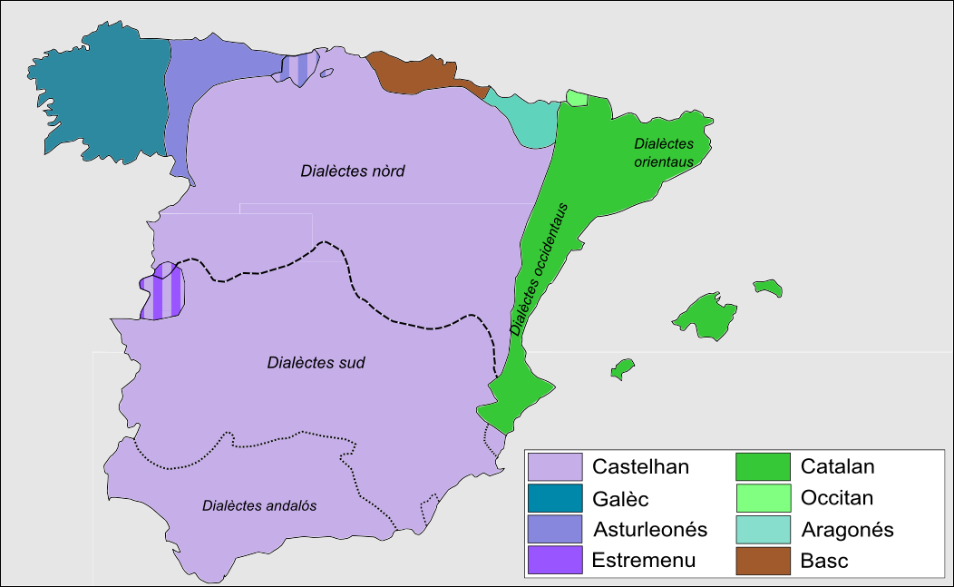 Lengas tradicionalas d'Espanha.